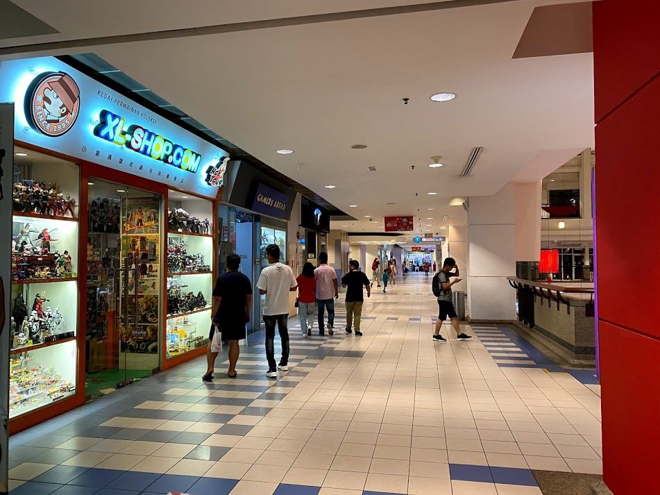 吉隆坡時代廣場內部